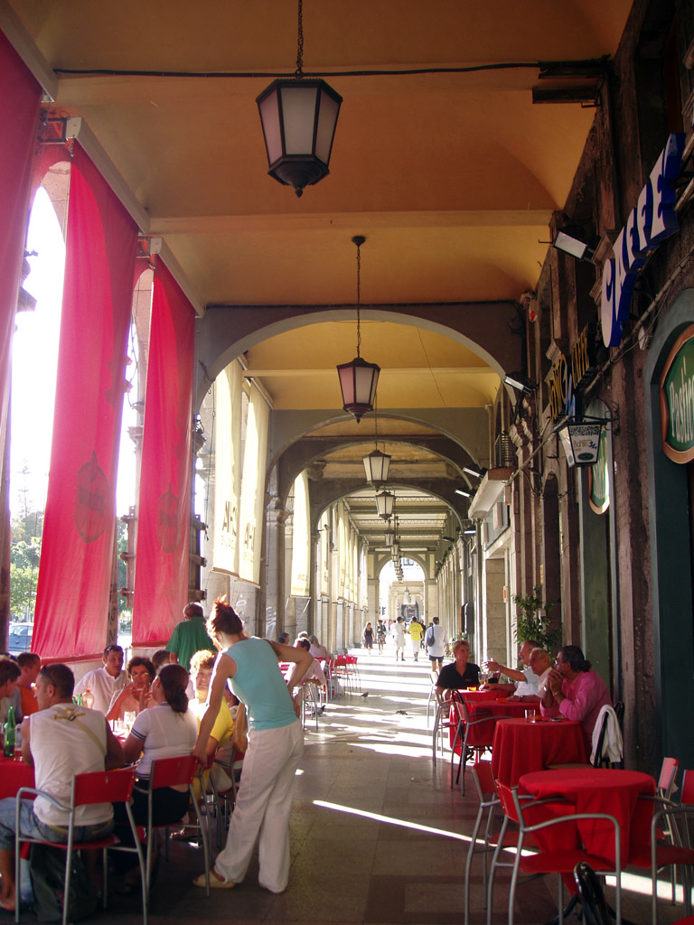 Cagliari, arcades in via Roma.